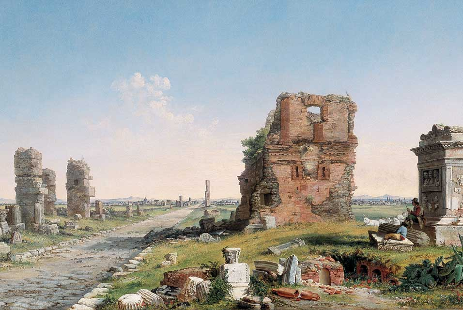 Via Appia